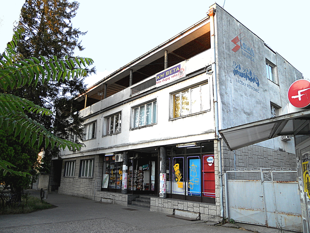 Štamparija Kultura u Bačkom Petrovcu